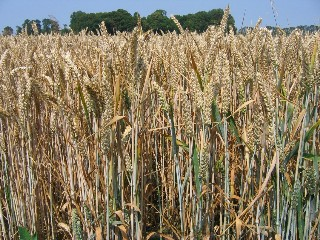 (photo prise en France, Seine-Maritime, à La Cerlangue)